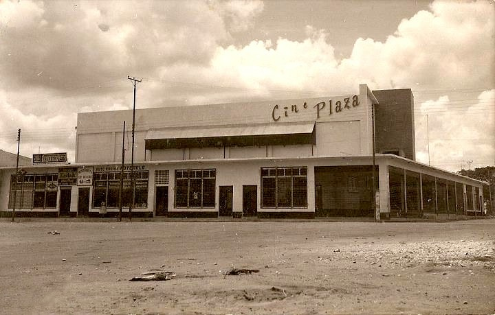 El Tigre Cine Plaza, Estado Anzoátegui - Venezuela (1960)